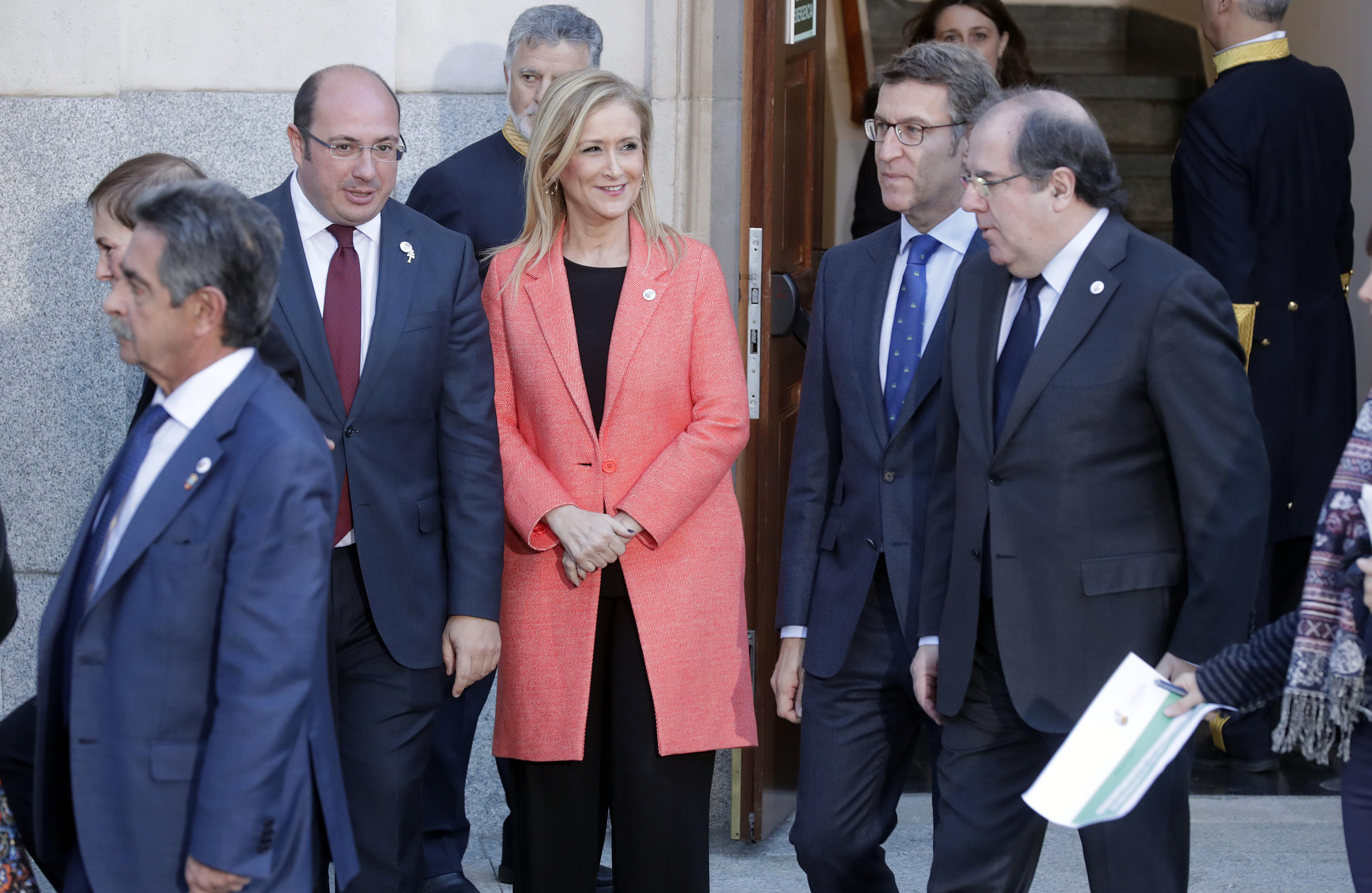 Hoy durante la #ConferenciaPresidentes he expresado las dos cuestiones que para mi gobierno son prioritarias, por un lado la necesidad de nuevo sistema de financiación autonómico, el cual debe ser sencillo, negociado, y aprobado con el mayor consenso posible, para que tenga vocación de permanencia; y por otro corregir la financiación de la dependencia, dado que nuestro caso el 84% del gasto destinado a este concepto lo aporta la Comunidad de Madrid, frente al 16% del Estado, siendo esta la asignatura pendiente del Estado del Bienestar, sin olvidarnos de otras cuestiones relevantes como el transporte público, la renta mínima o la sanidad, en este caso a través de un gran pacto nacional.